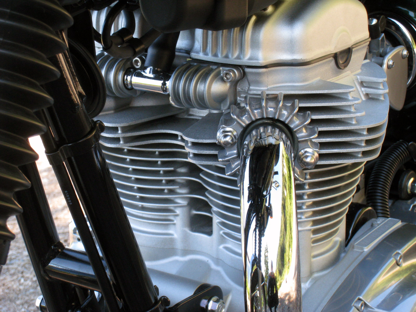 Zweizylinder an der Kawasaki W800